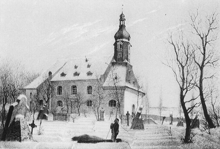 Lithografie der Lorenzkirche mit Friedhof